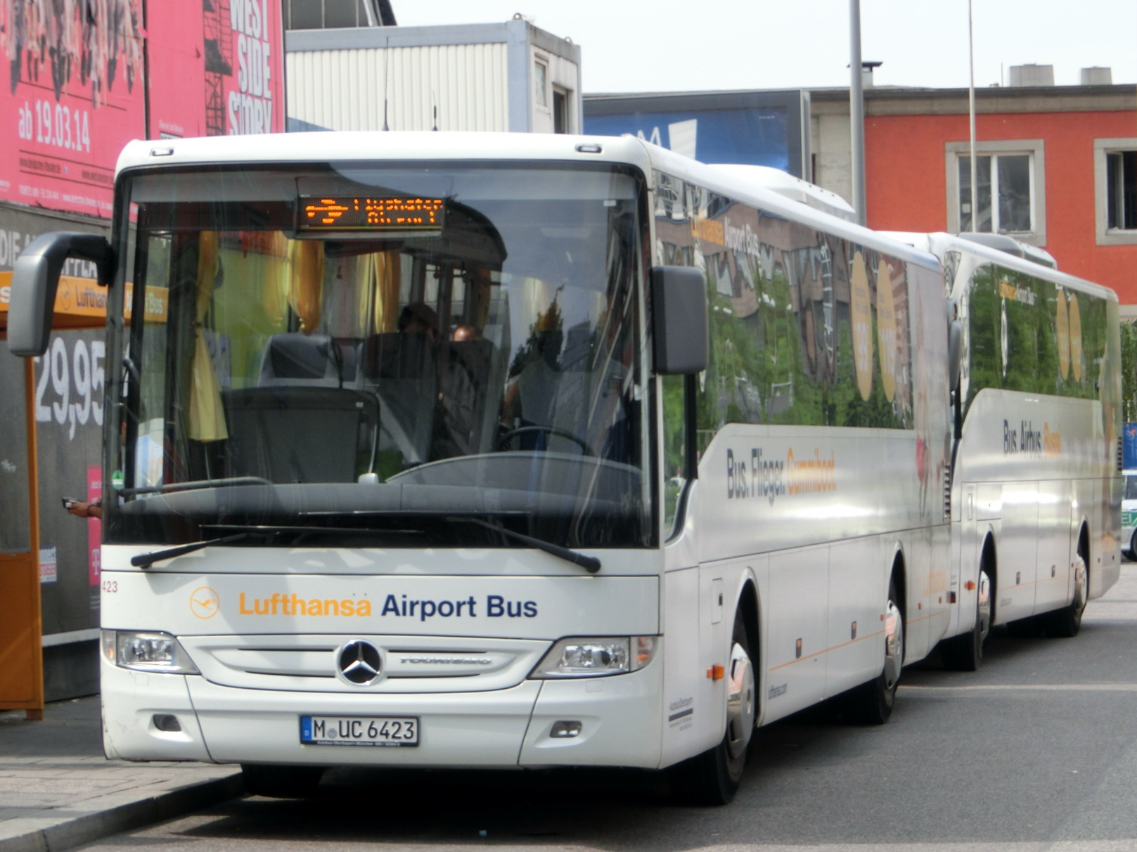 Ein Mercedes-Benz Tourismo RH als 'Lufthansa Airport Bus' am Münchener Hauptbahnhof. Eigentümer dieses Omnibusses ist die Firma Autobus Oberbayern, welche ihm die Wagennummer 423 zugeteilt hat. Dahinter ist ein Mercedes-Benz Tourismo RHD zu sehen, der ebenfalls für die Lufthansa fährt. Die Aufnahme entstand am 23. August 2013.